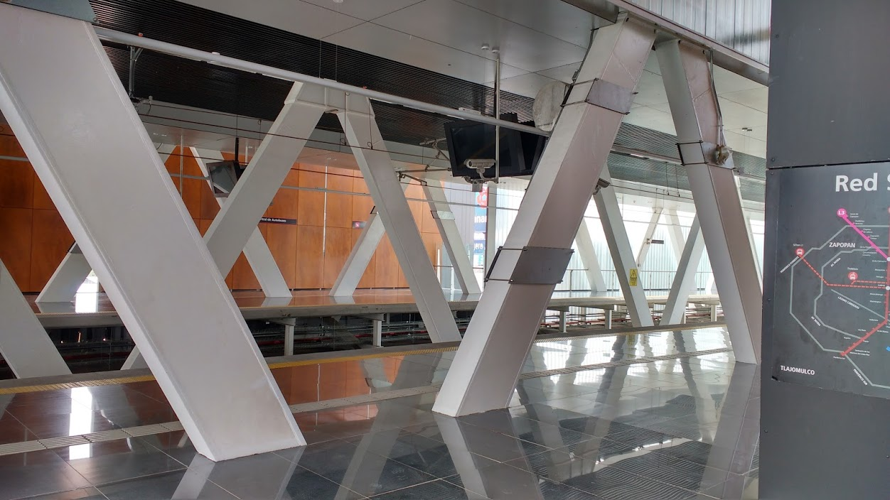 Vista interior de la estación Revolución (antes Plaza Revolución) de la Línea 3 del Tren Ligero.